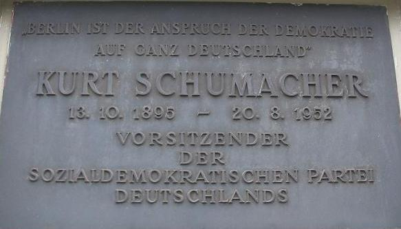 Gedenktafel an Kurt Schumacher am Kurt-Schumacher-Haus in Wedding